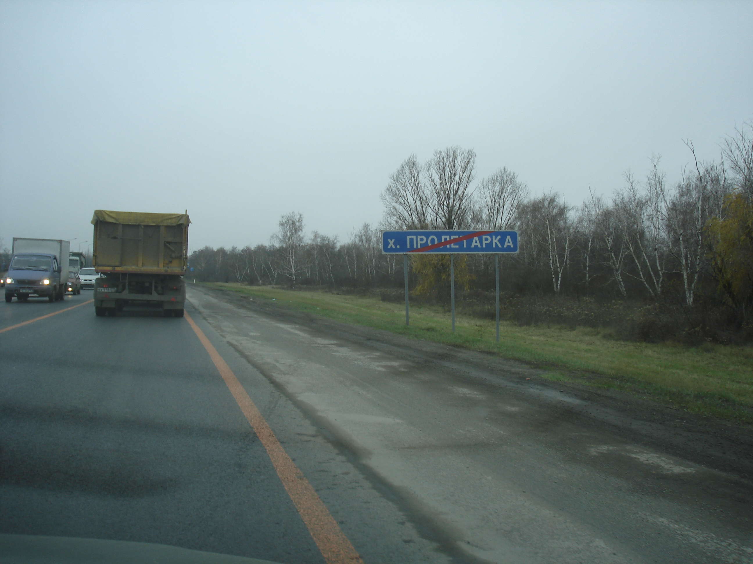 Дорожный знак на автотрассе М4-Дон при выезде из хутора Пролетарка (Красносулинский район).